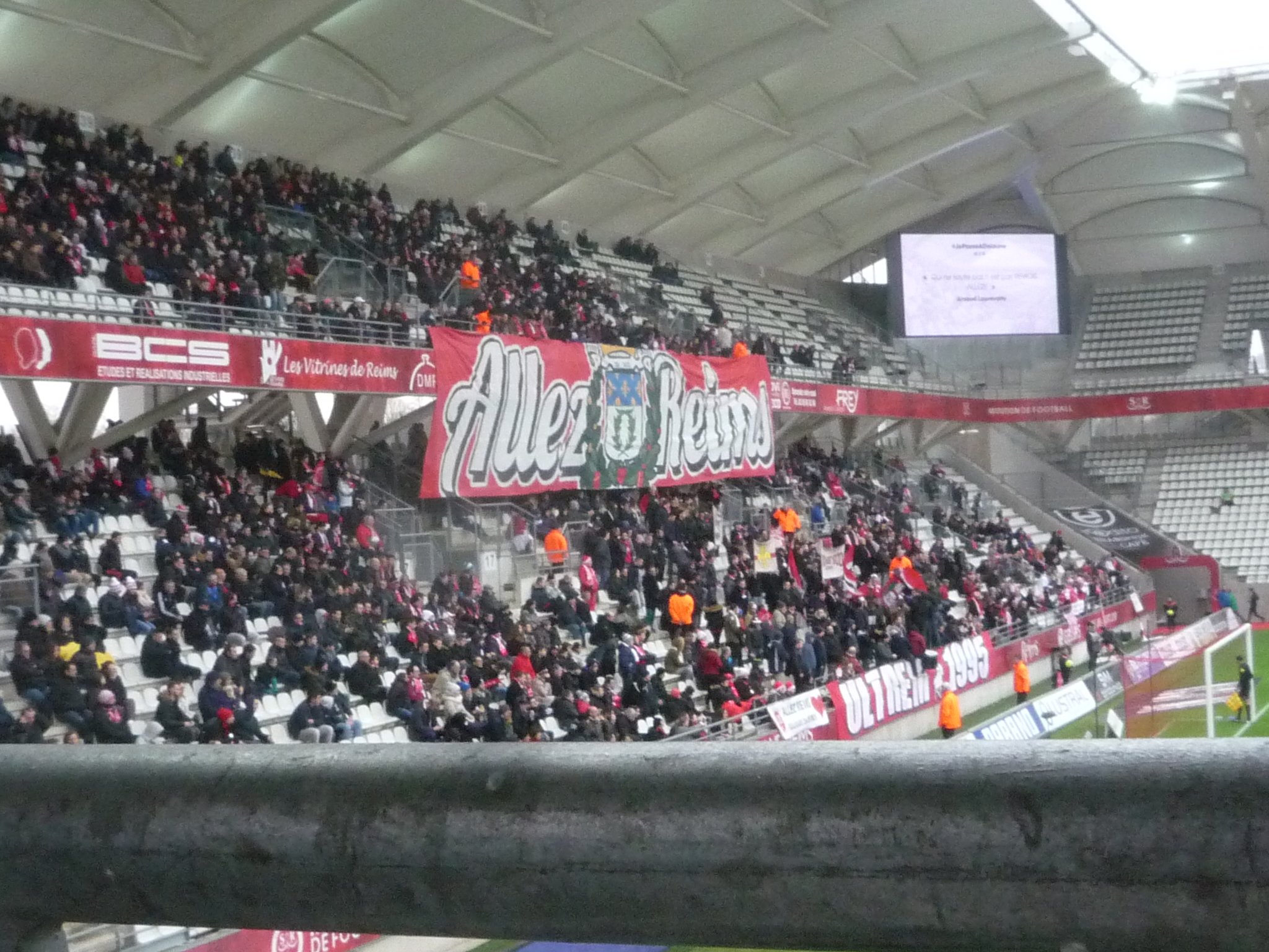 Tribune Jonquet lors de Reims-Sochaux le 11/02/2005